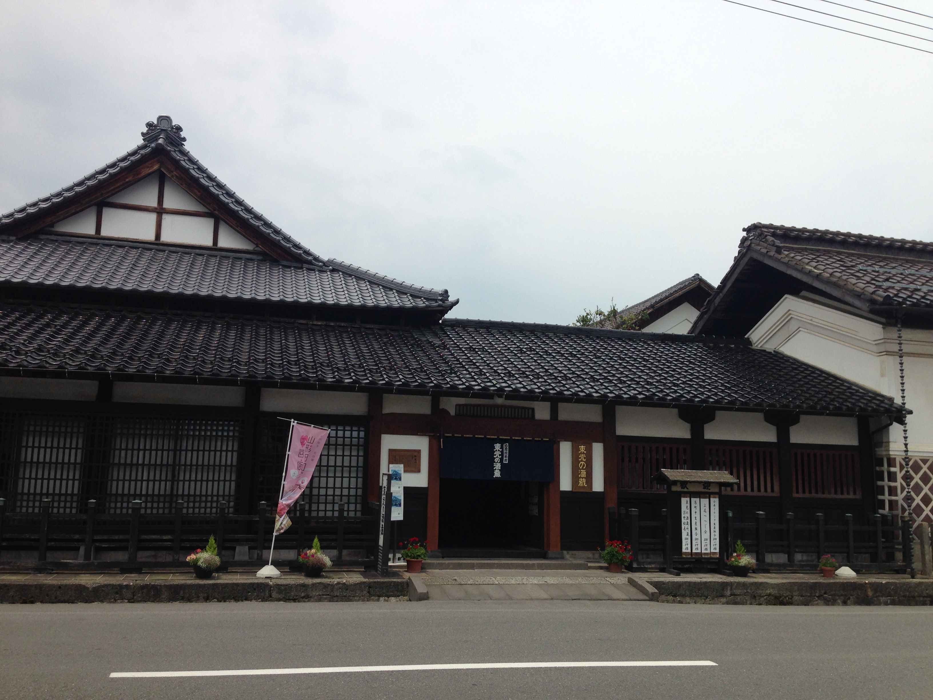 小嶋屋総本店 米沢市内にあり、見学も積極的に受けている。